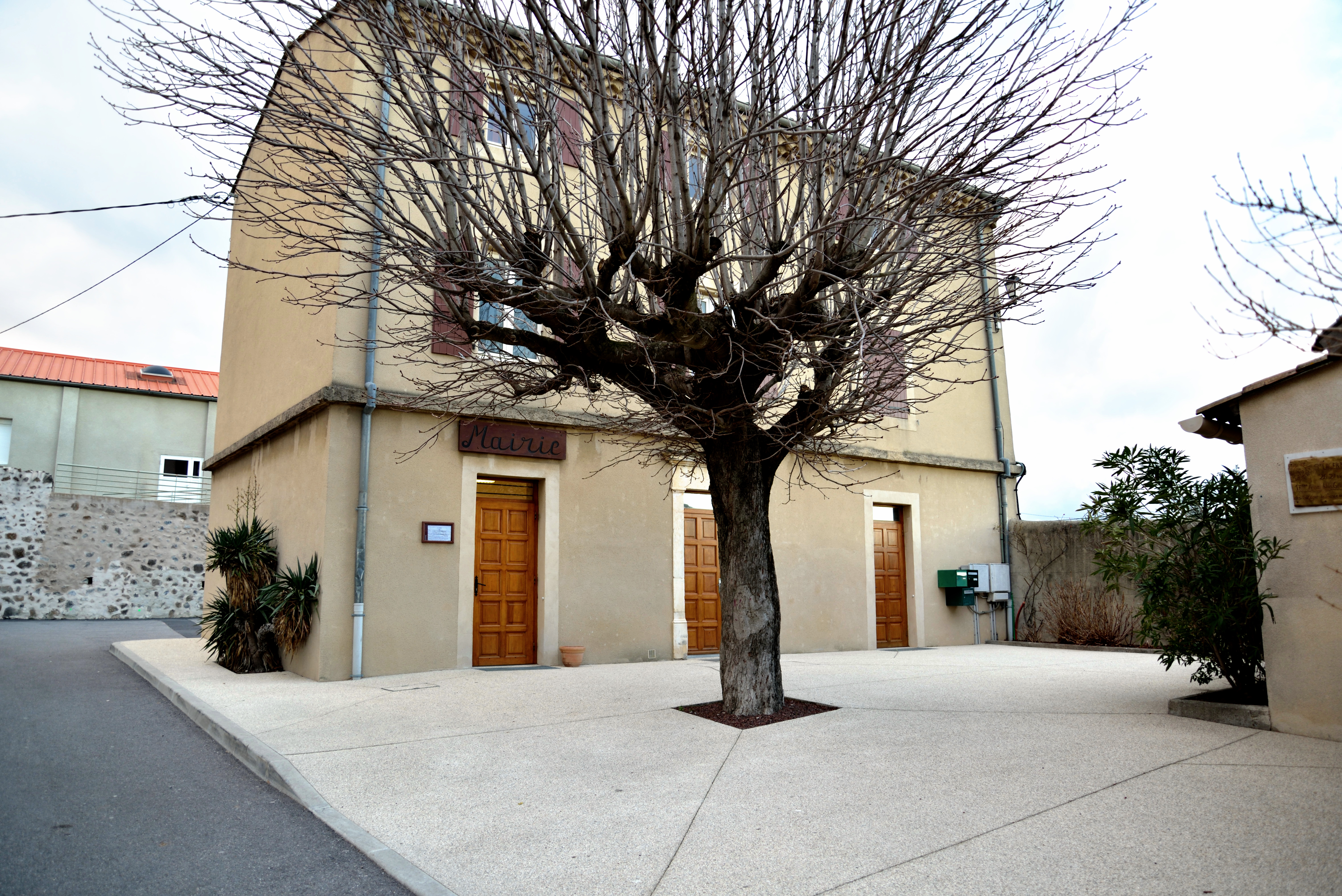 mairie